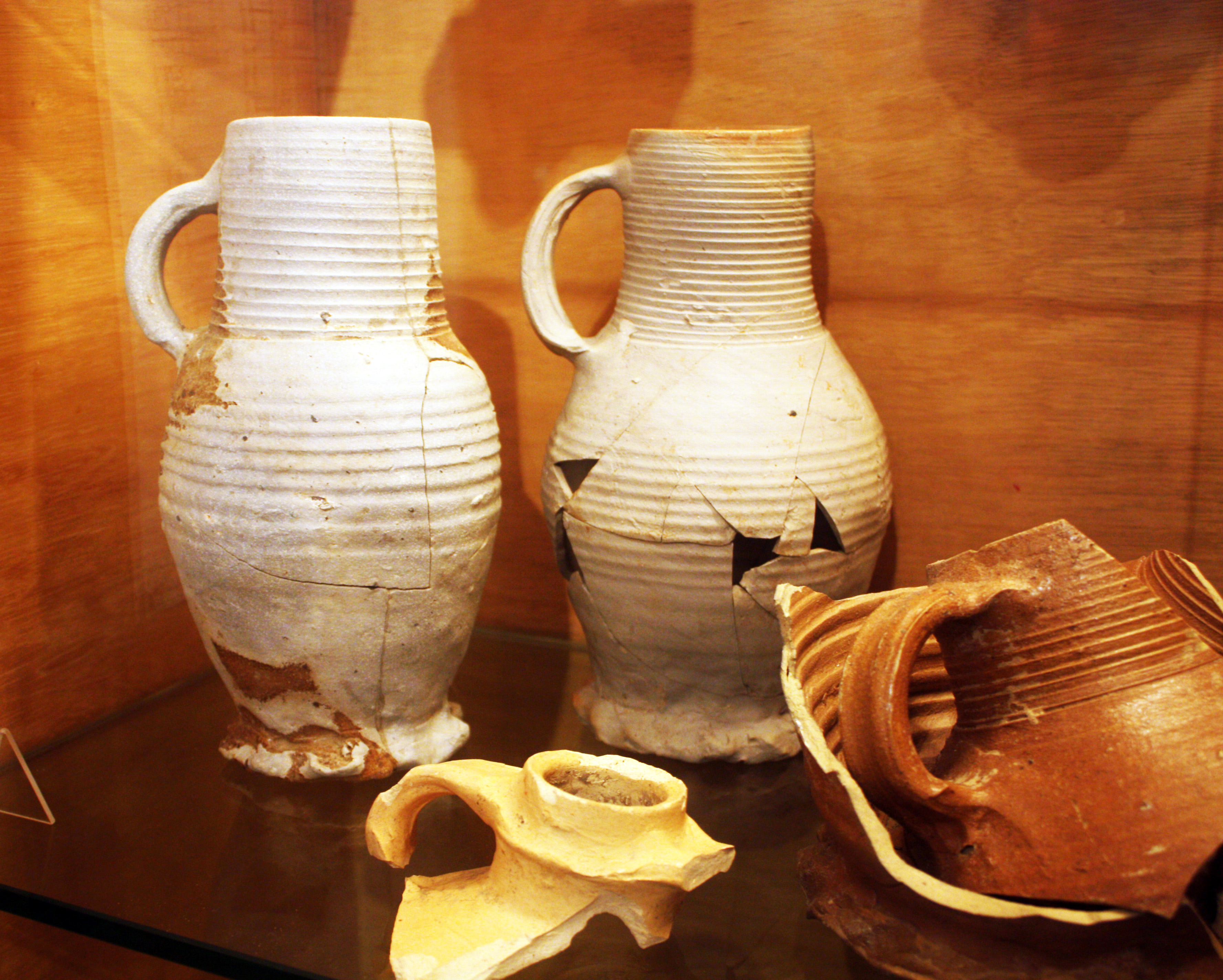 Henkelkrüge, Keramiken der Südstadt, Köln. (16. Jh.)